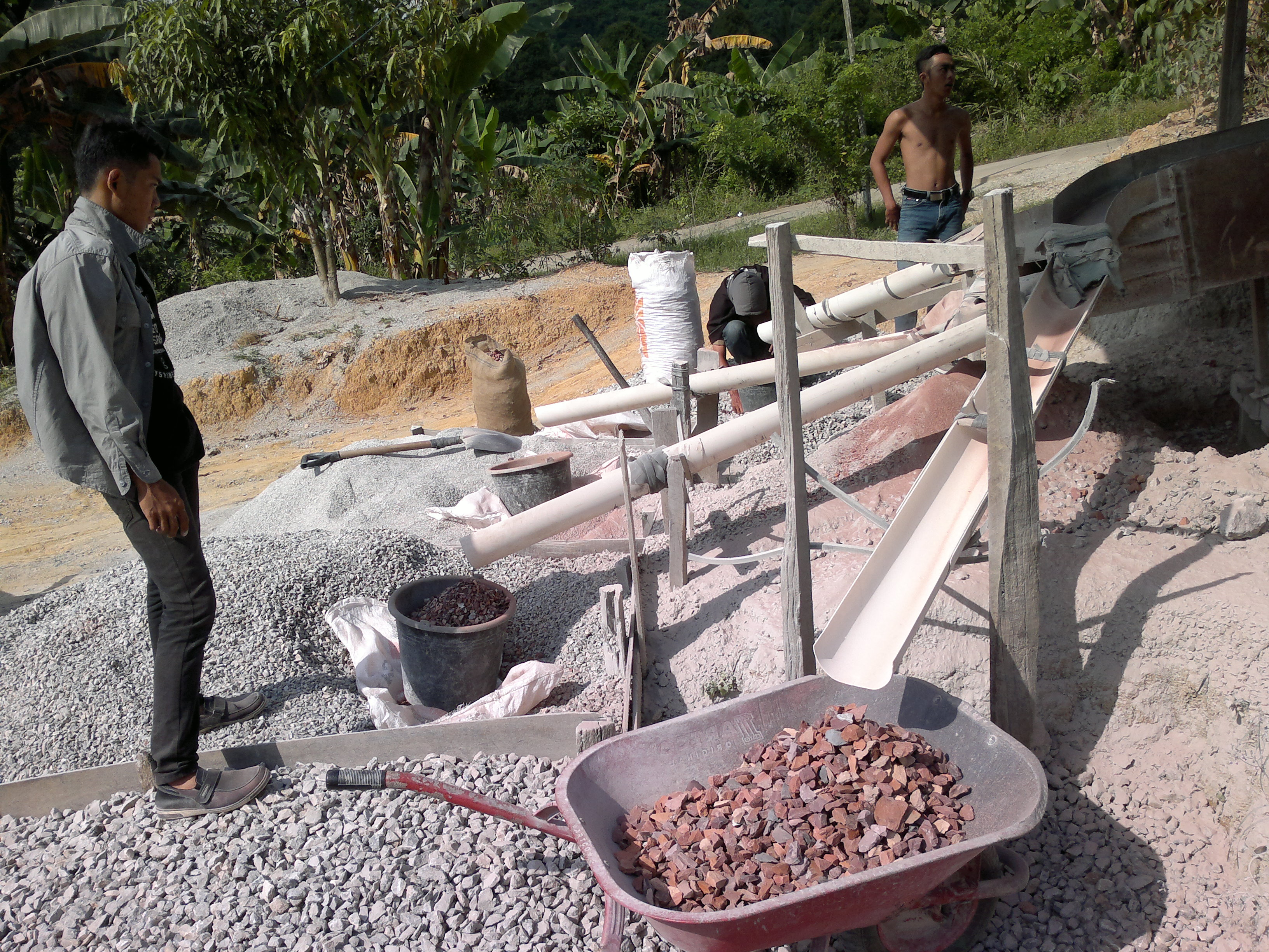 Pengolahan laterit di lokasi